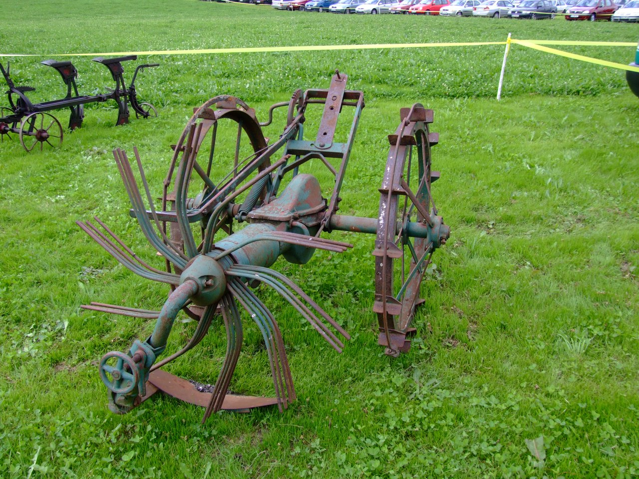 Kartoffelroder Lanz LK30